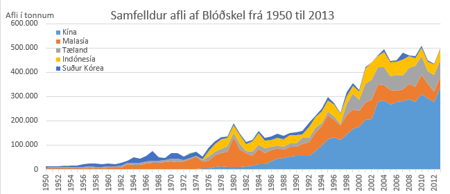 Samfelld veiði á Blóðskel frá 1950 til 2103.